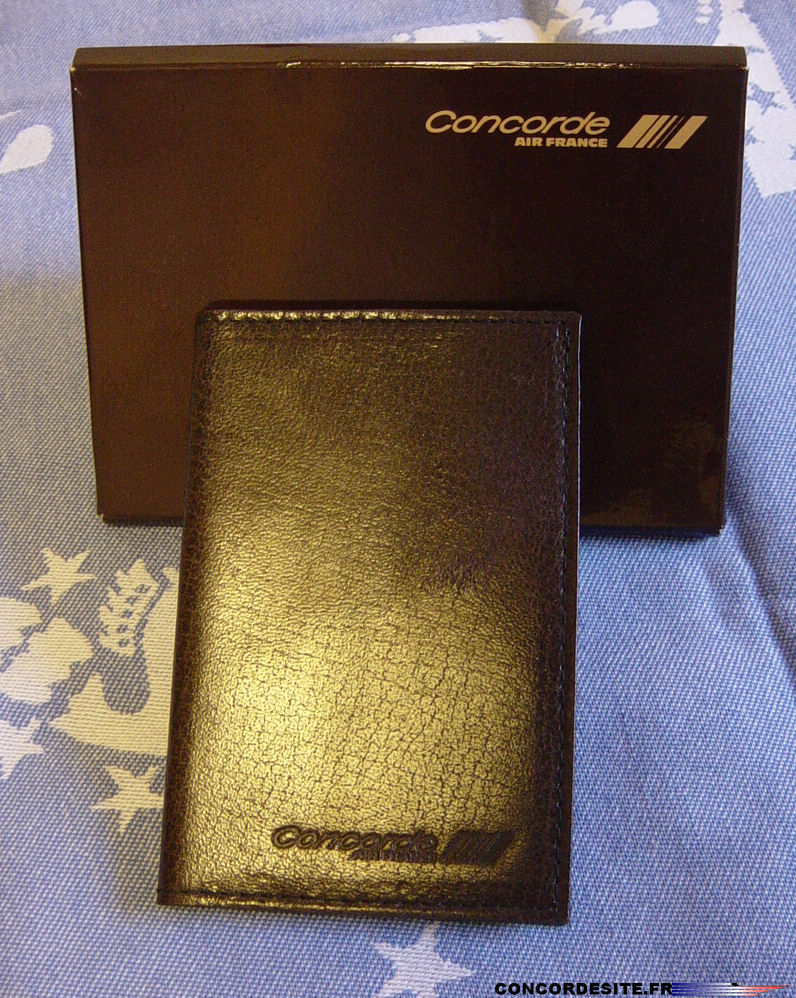 Porte-Cart en cuir siglé Air France CONCORDE (US) Credit-card holder signed Air France CONCORDE